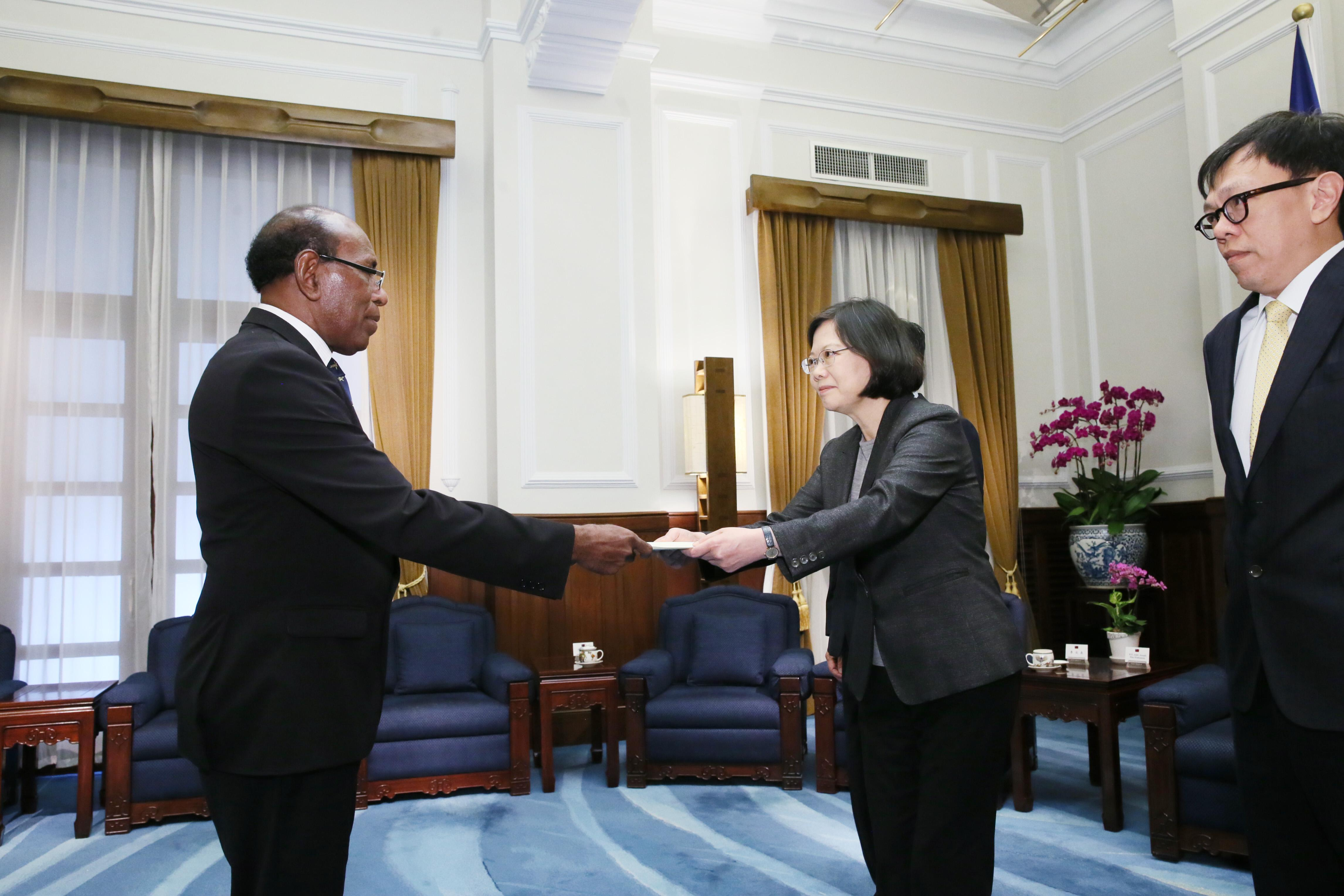 12.01 索羅門群島新任駐華特命全權大使王哲夫，向蔡總統呈遞到任國書後